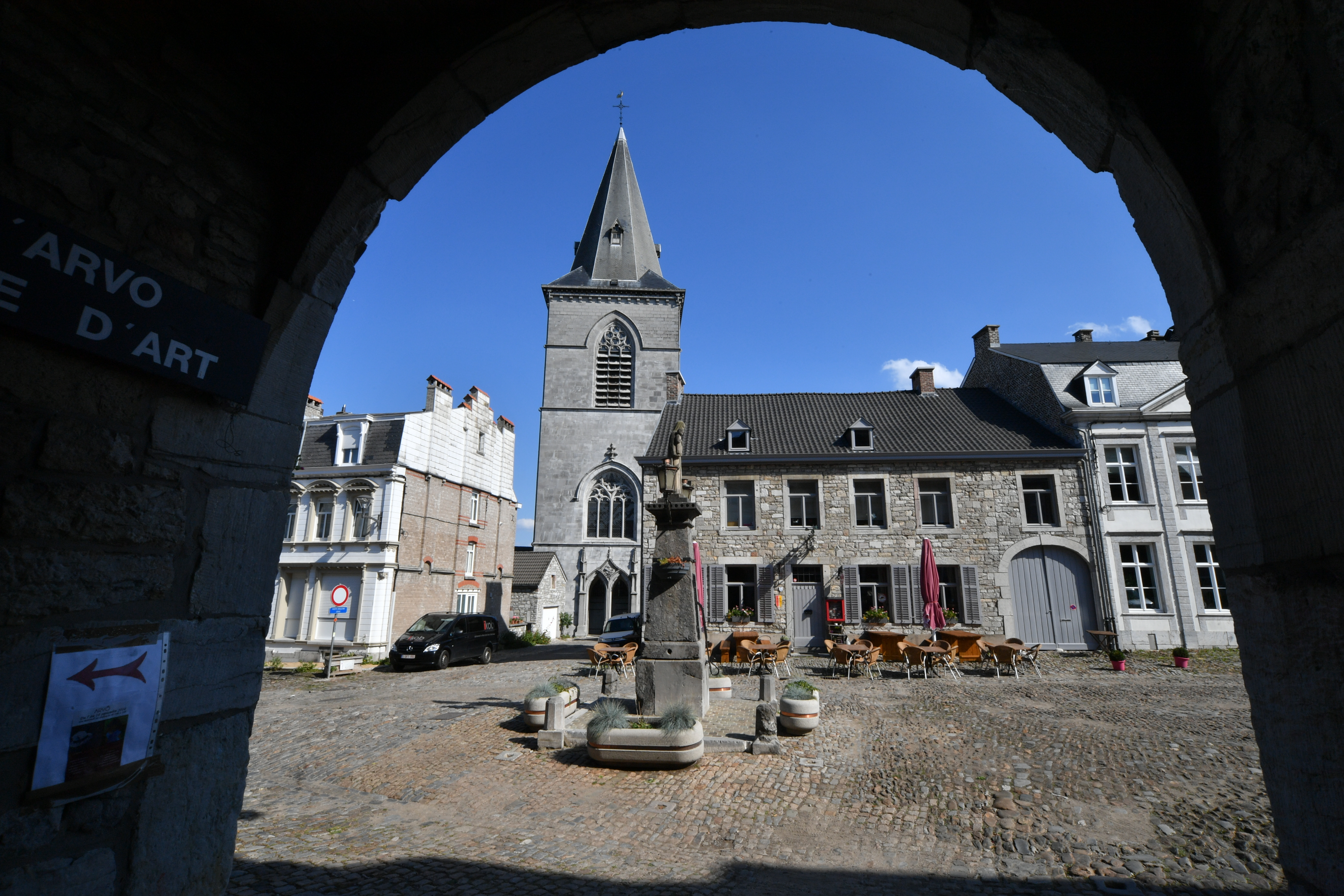 Limbourg Belgien, Provinz Lüttich, Bezirk Verviers